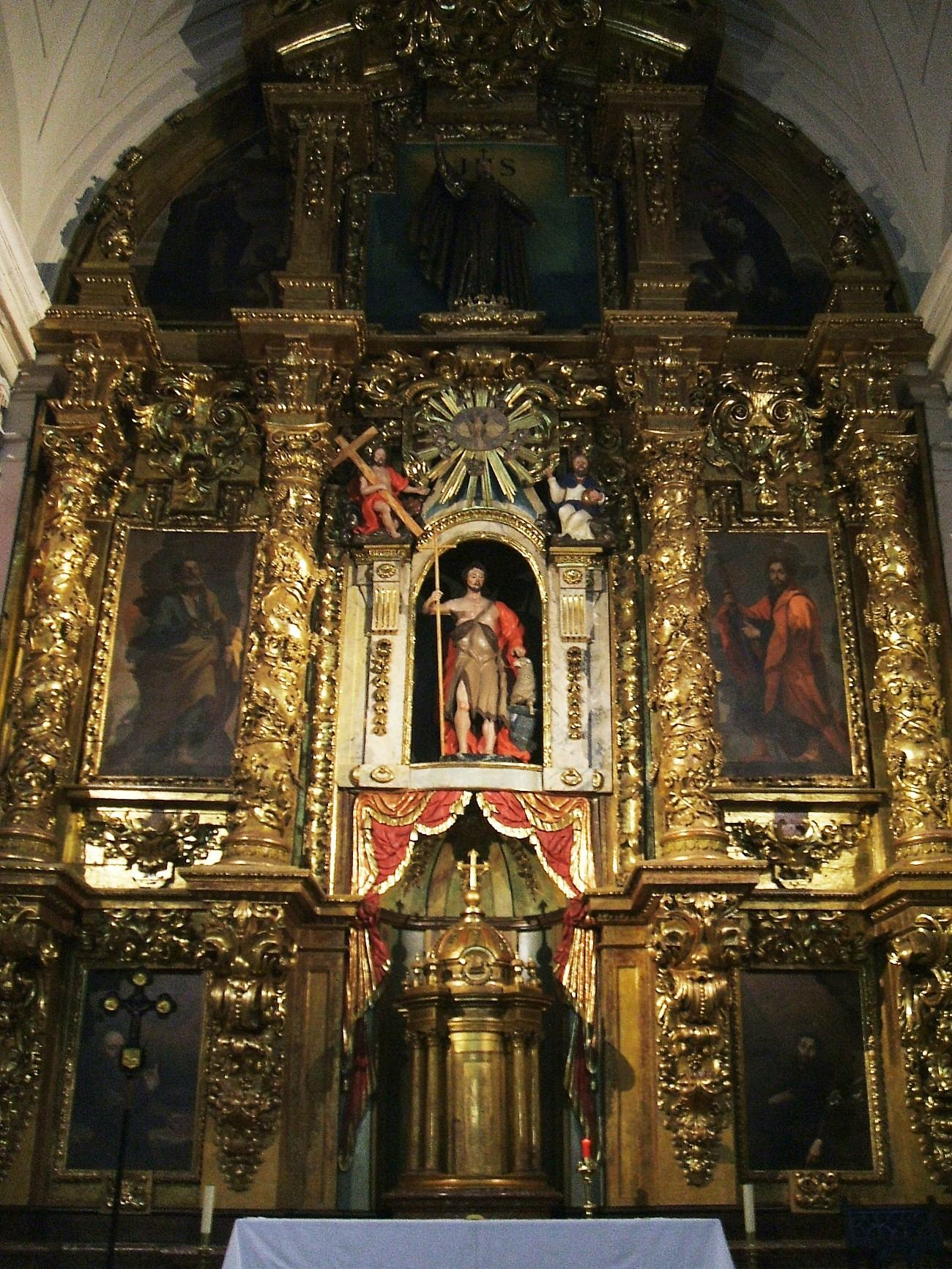 Retablo Mayor de la Iglesia de los Santos Juanes, Bilbao.